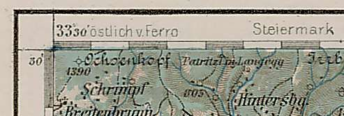 K.u.K. 1905-ös katonai felmérés lapja